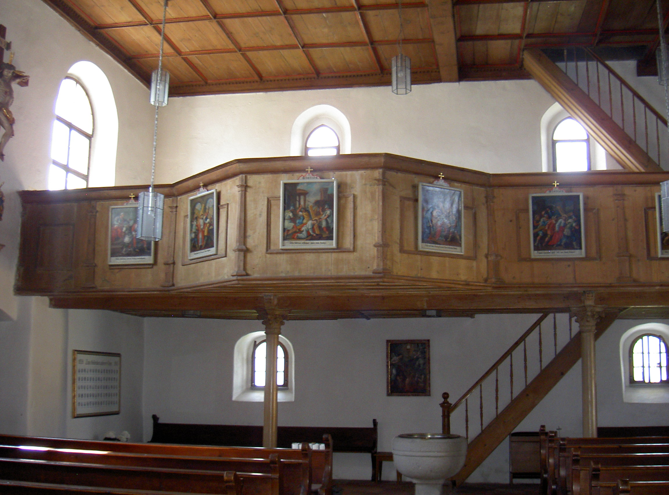 Altenstadt, Simultankirche St. Johannes Baptist